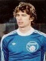 Arsène Wenger (1979, RC Strasbourg), 'Eurofootball 1978 - 1979', Panini figurina